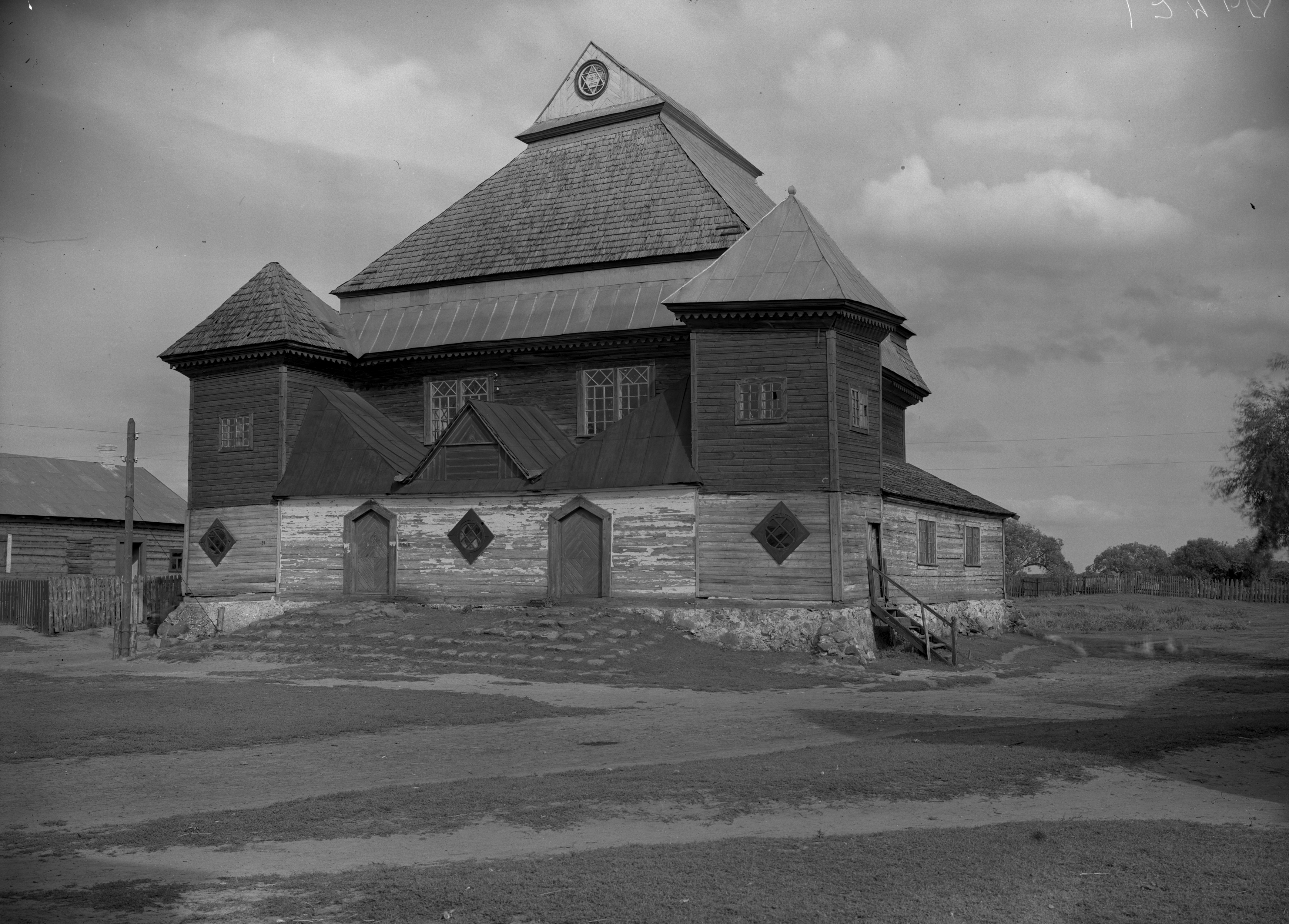 Беларуская (тарашкевіца): Пескі (Pieski). Сынагога